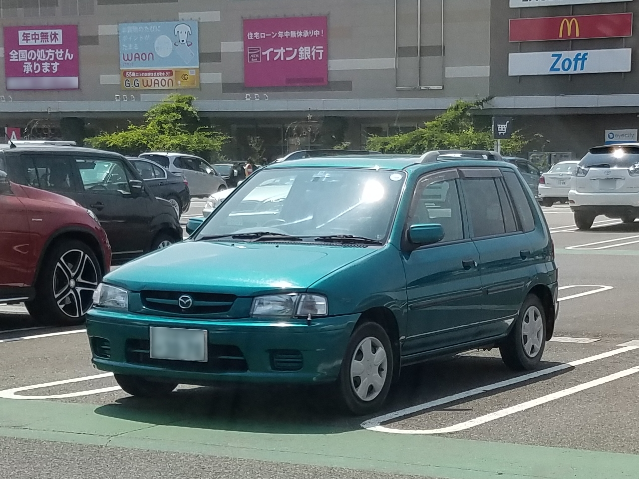 デミオ LX Gパッケージ（中期型）